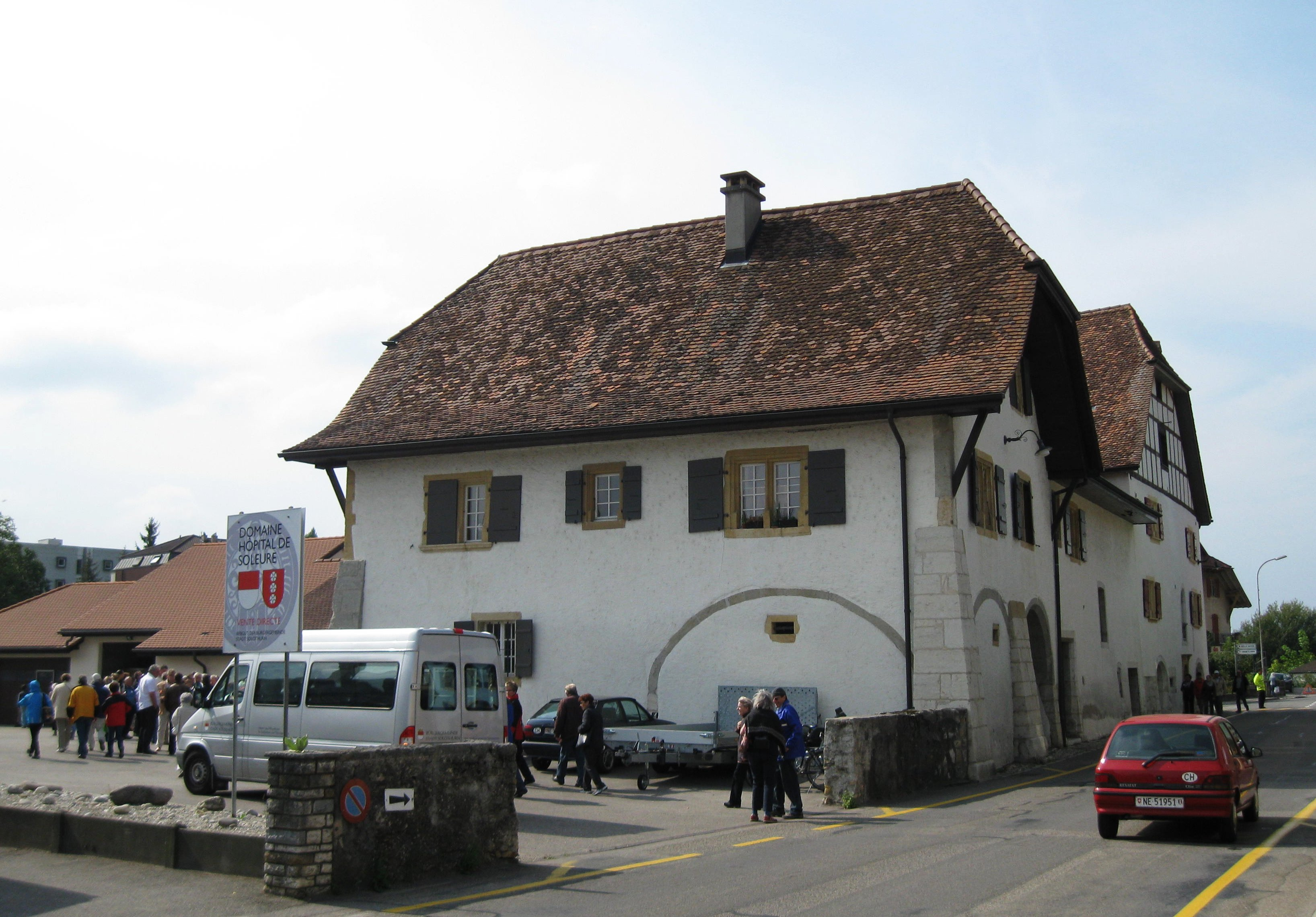 Weinkellnerei der Bürgergemeinde Solothurn, die in Landeron umfangreiche Rebberge besitzt und sowohl Weisswein, Rose und Rotwein produziert von sehr guter Qualität